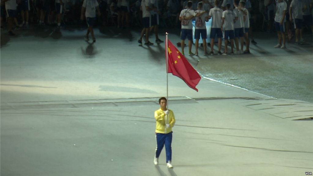 中国运动员缺席2017年8月19日台北世大运开幕式（美国之音黎堡摄）